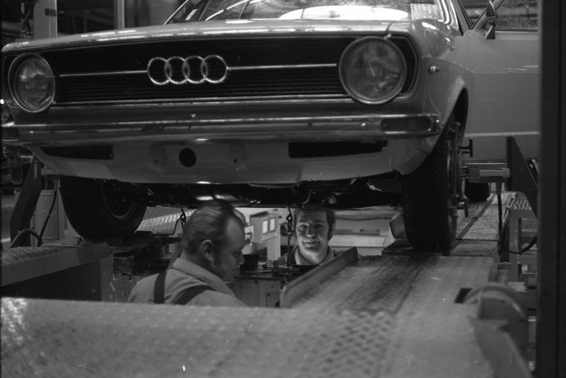 VW-Werk, Wolfsburg Audi 80